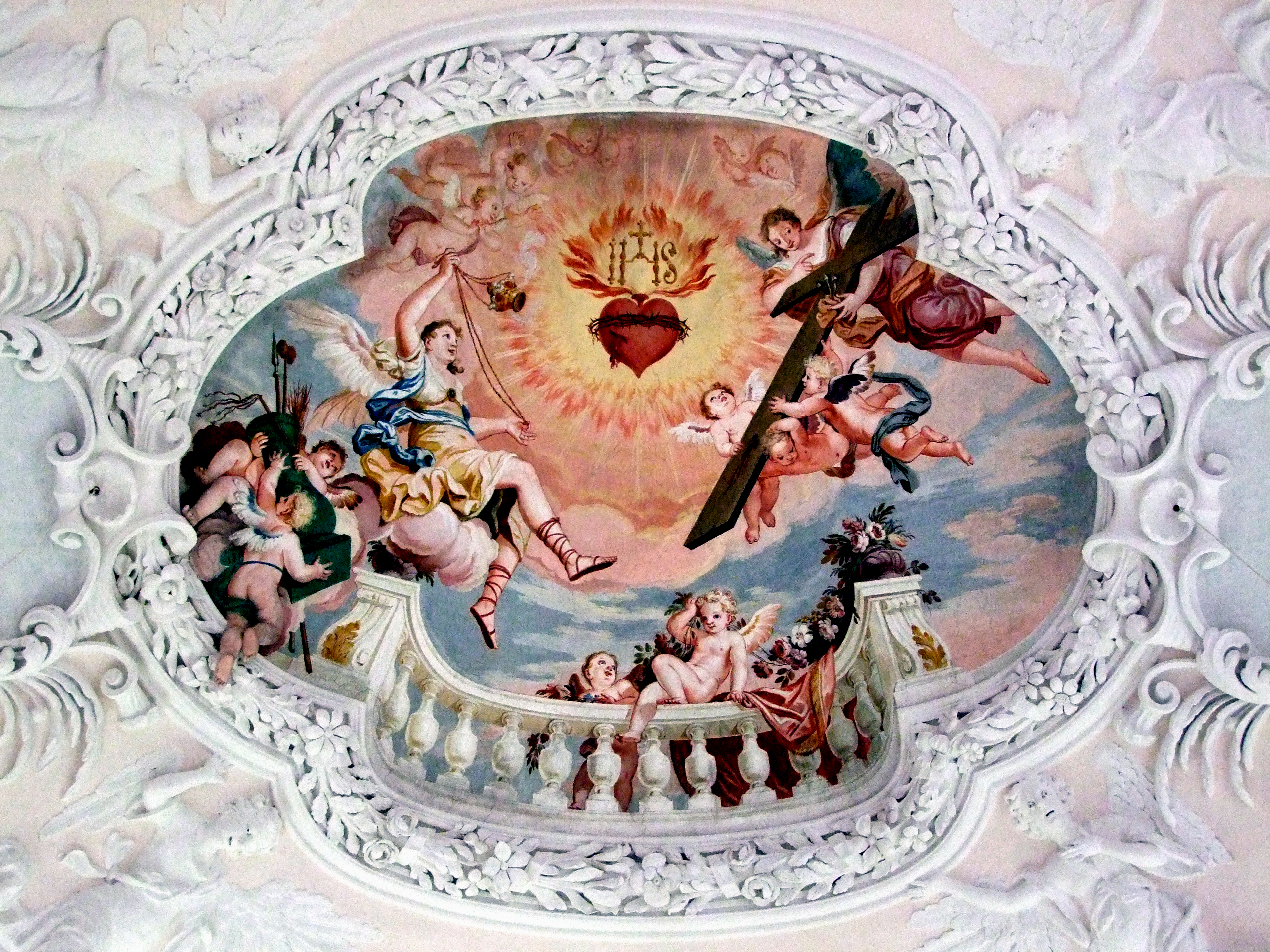 Ehemalige Klosterkirche der Kartause in Buxheim bei Memmingen